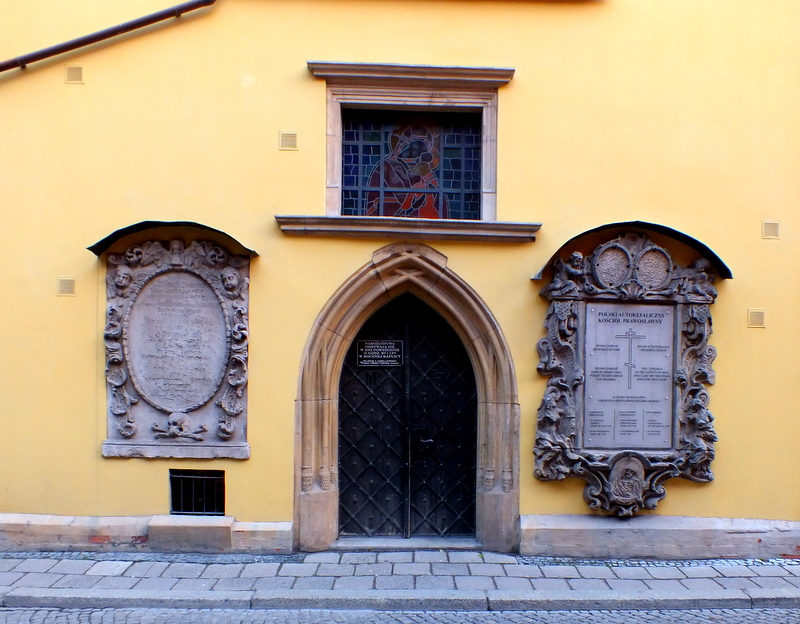 Wrocław, kościół św. Barbary, ob. katedra prawosławna p.w. Narodzenia Przenajświętszej Bogurodzicy, 1430-1440, 1570, 1964-1967